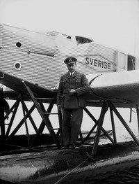 Albin Ahrenberg (1889-1968) försökte flyga västerut över Atlanten men kom bara till Grönland. Under 20- och 30-talen gjorde han propaganda för flyget med ett flertal rundflygningsturnéer över hela landet.